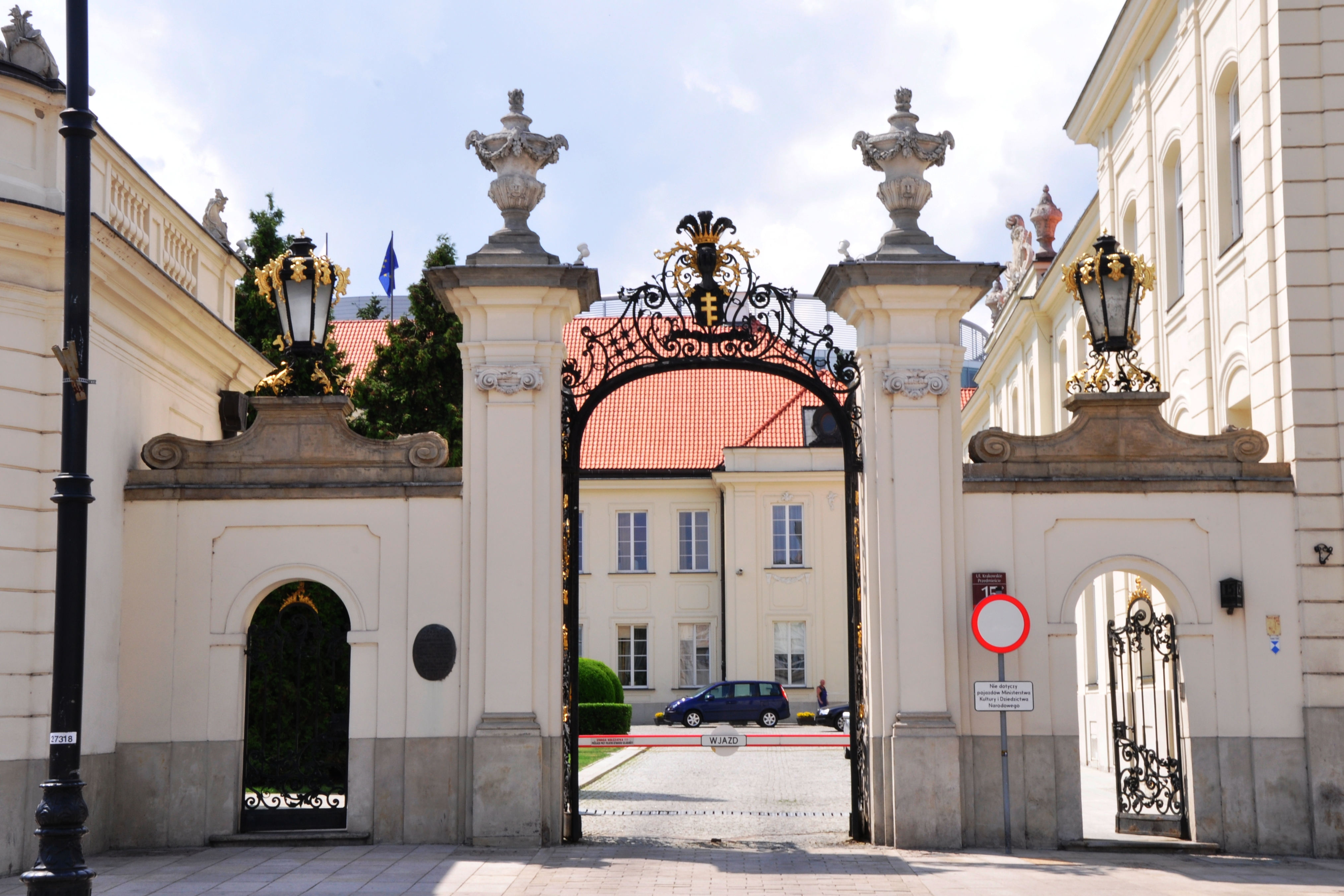 Potocki-Palast Warschau, noerdliche Einfahrt von Krak. Prezd.